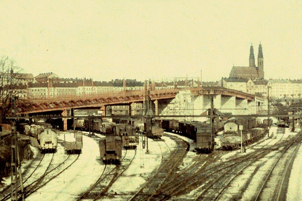 Liljeholmsbron och bangården